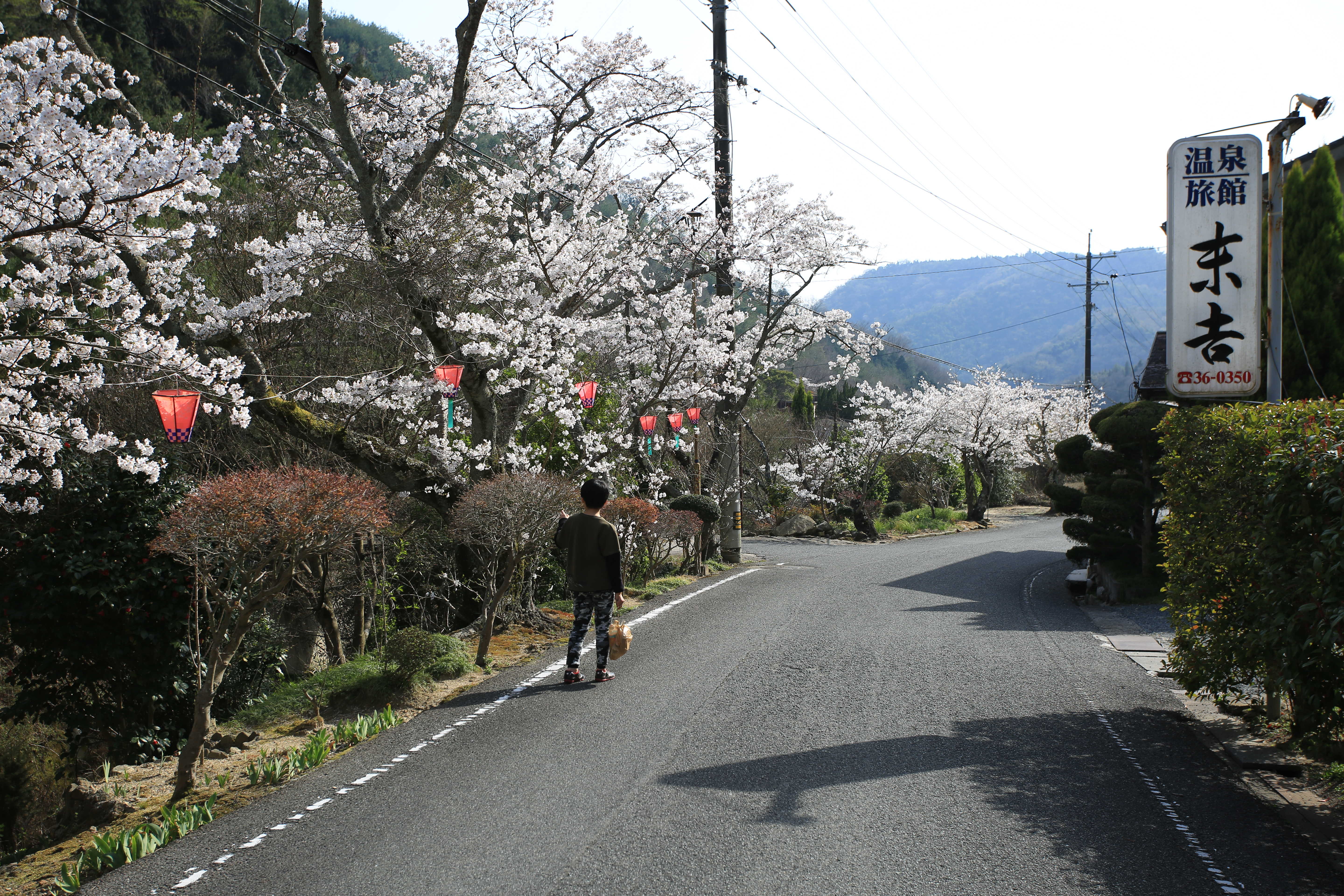 広島県福山市本郷町の本郷温泉のメインストリート。桜満開。